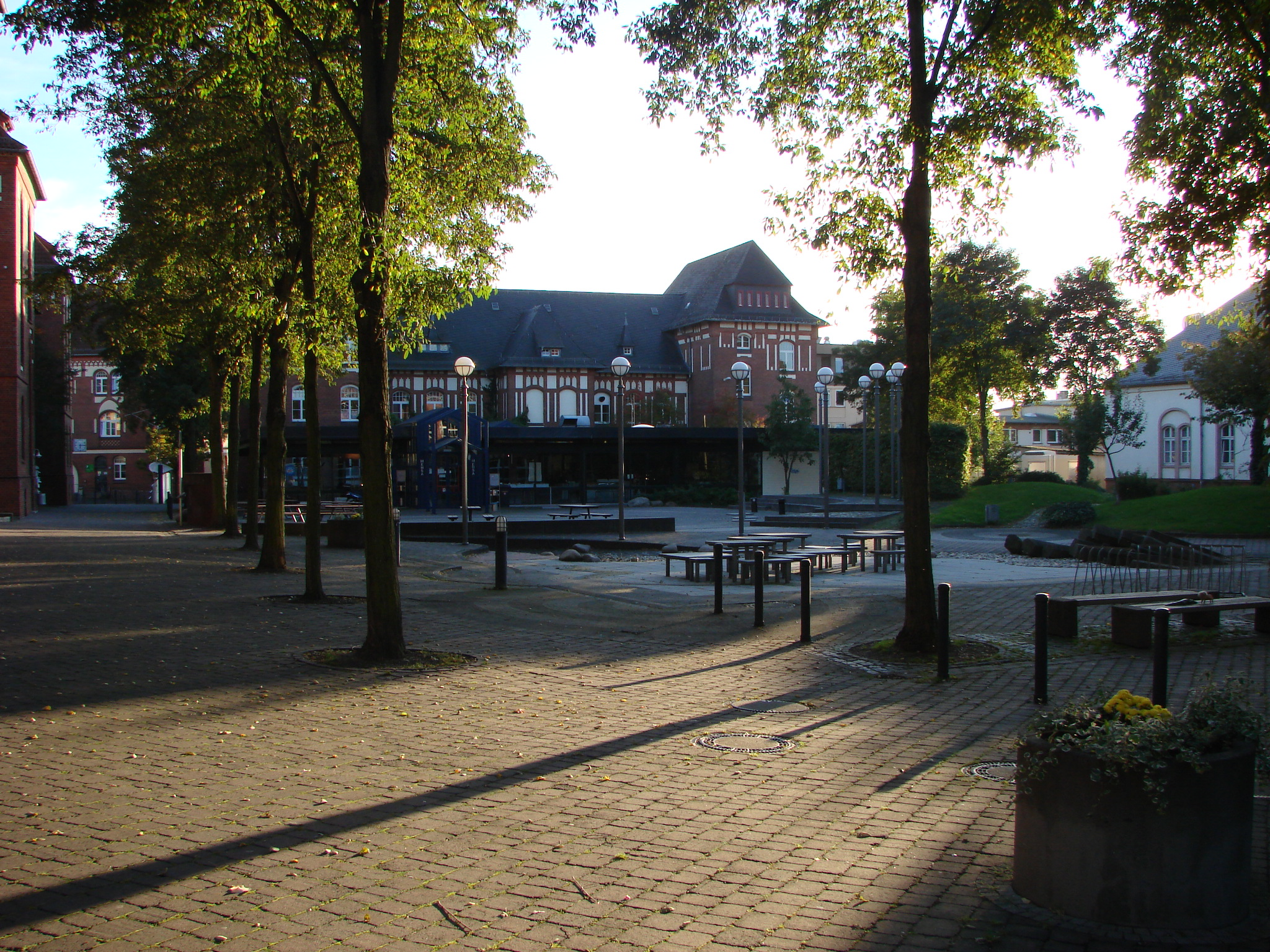 Das ehemalige Zentrum der Hochschule Fulda